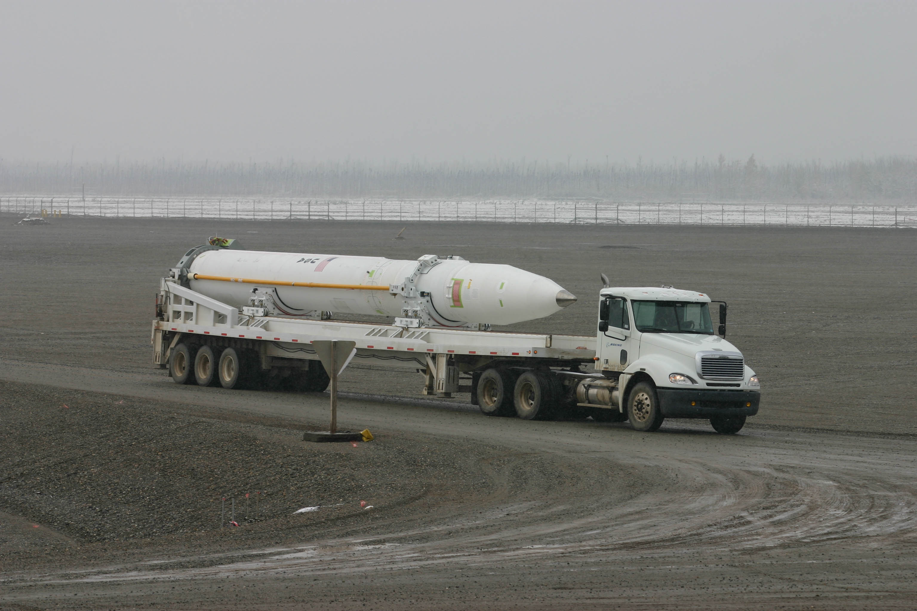 Antyrakieta GBI w bazie Fort Greely na Alasce 22 lipca 2004 podczas transportu.